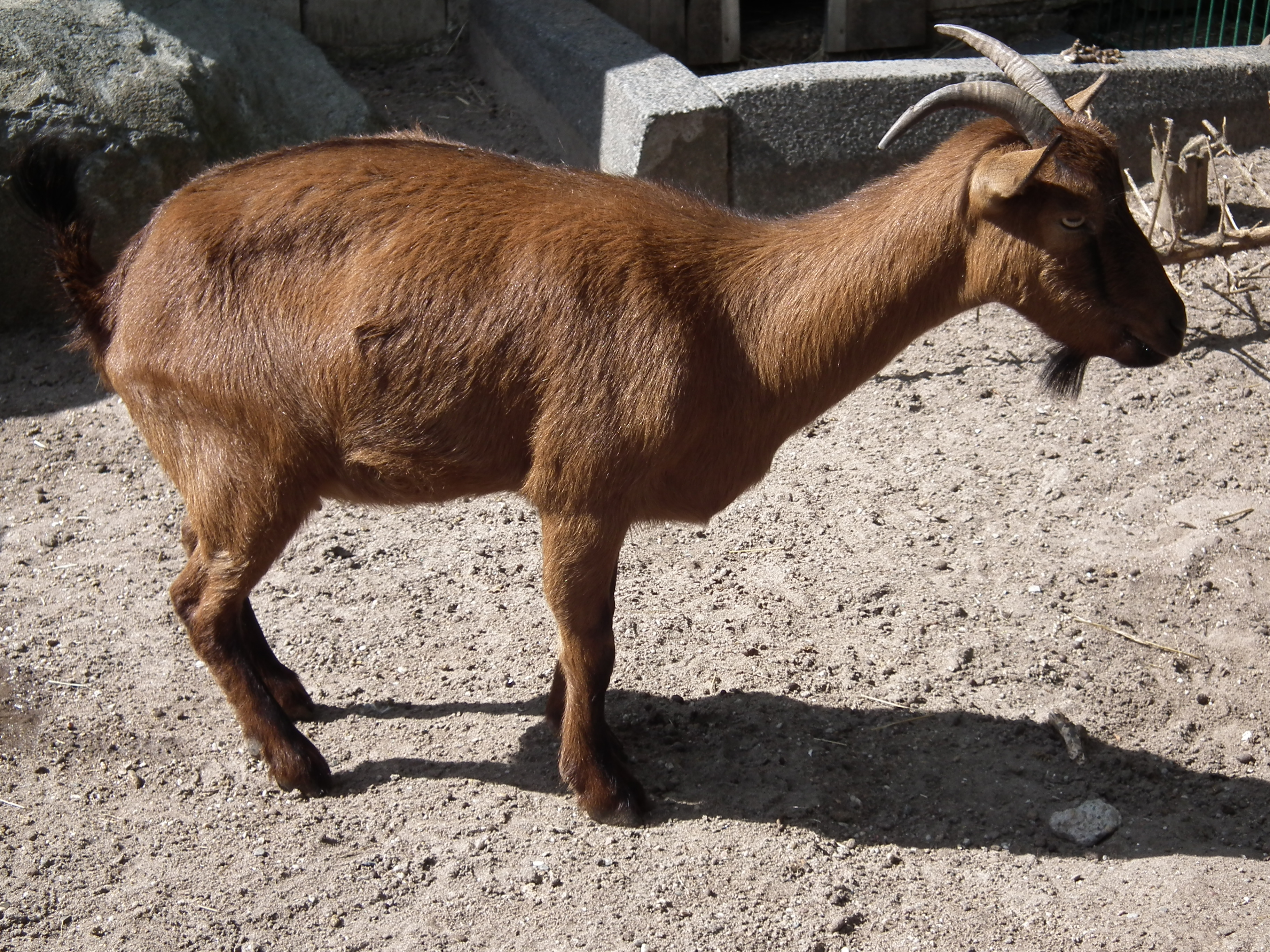 Weibliche Juan-Fernández-Ziege